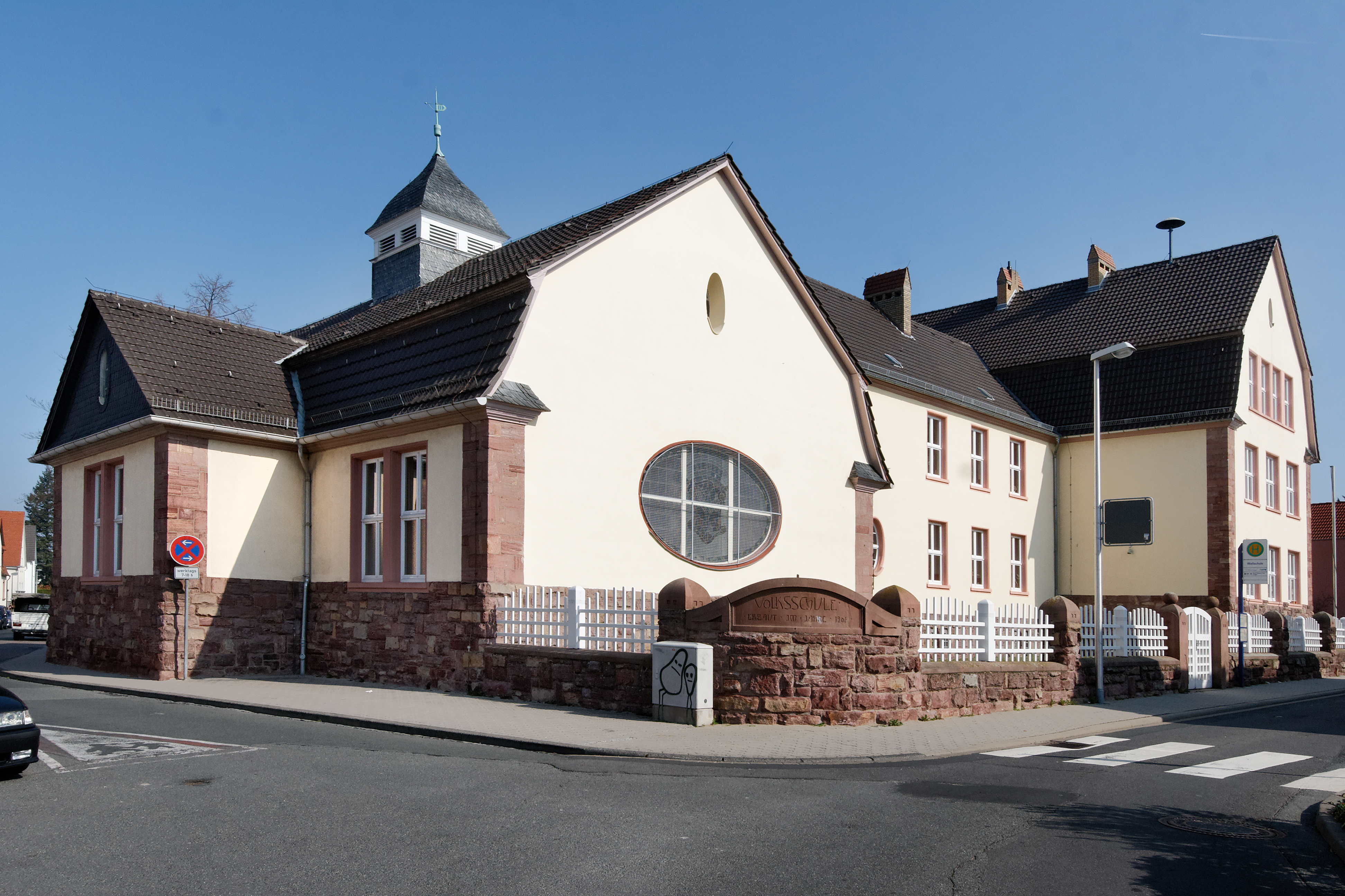 Wallschule (Grundschule) in Langen (Hessen), erbaut 1906. Am Eingang und an den ovalen Fenstern der Turnhalle zeigen sich Elemente des Jugendstils.